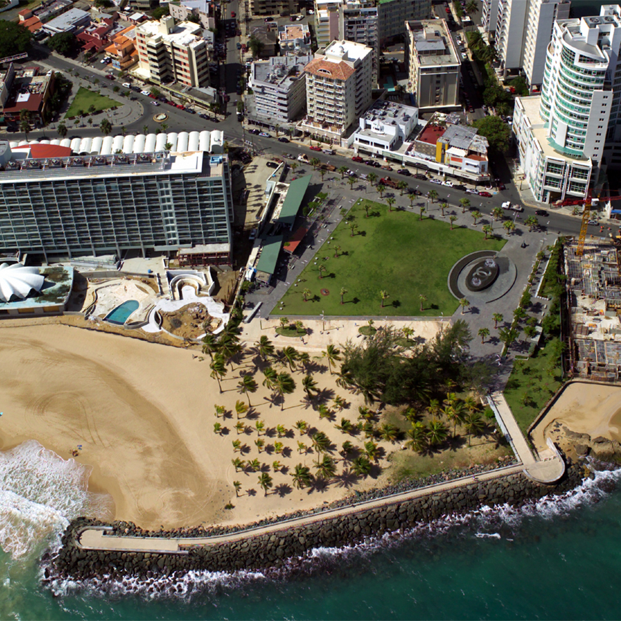 La Ventana al Mar, San Juan, Puerto Rico